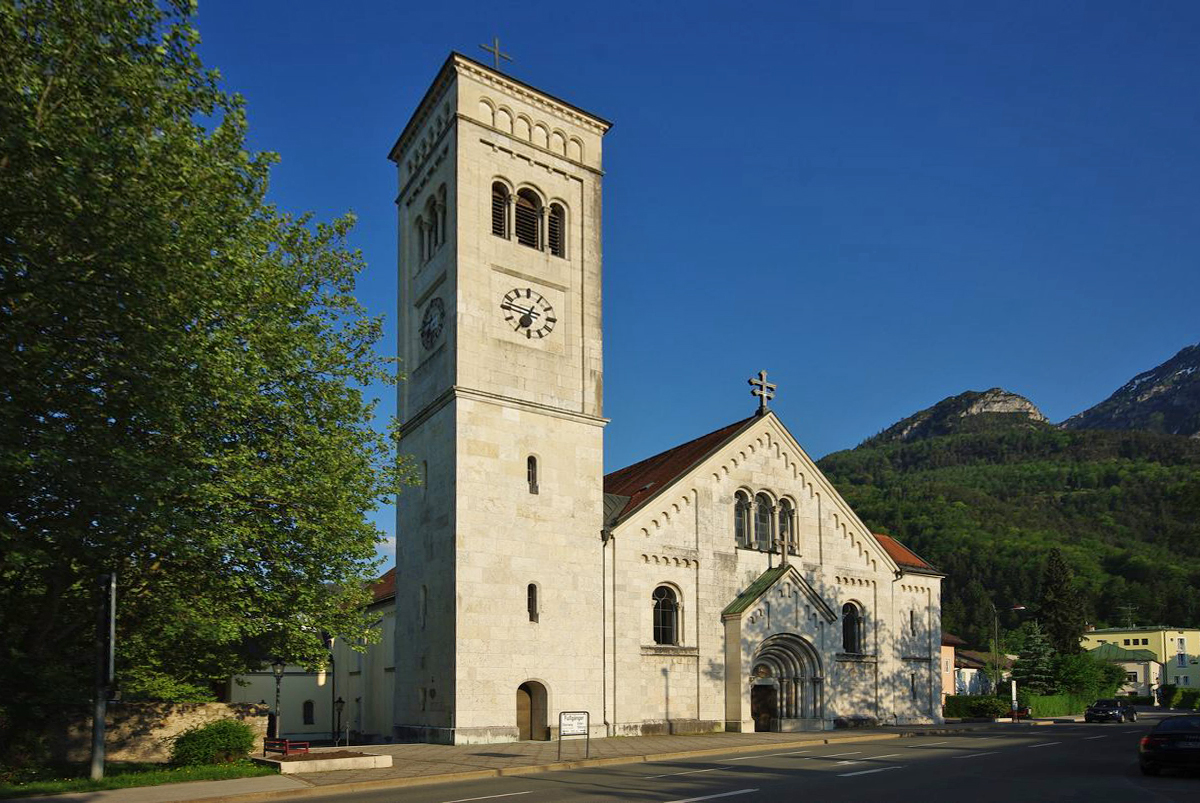 Pfarrkirche St. Nikolaus, Bad ReichenhallThis is a photograph of an architectural monument.